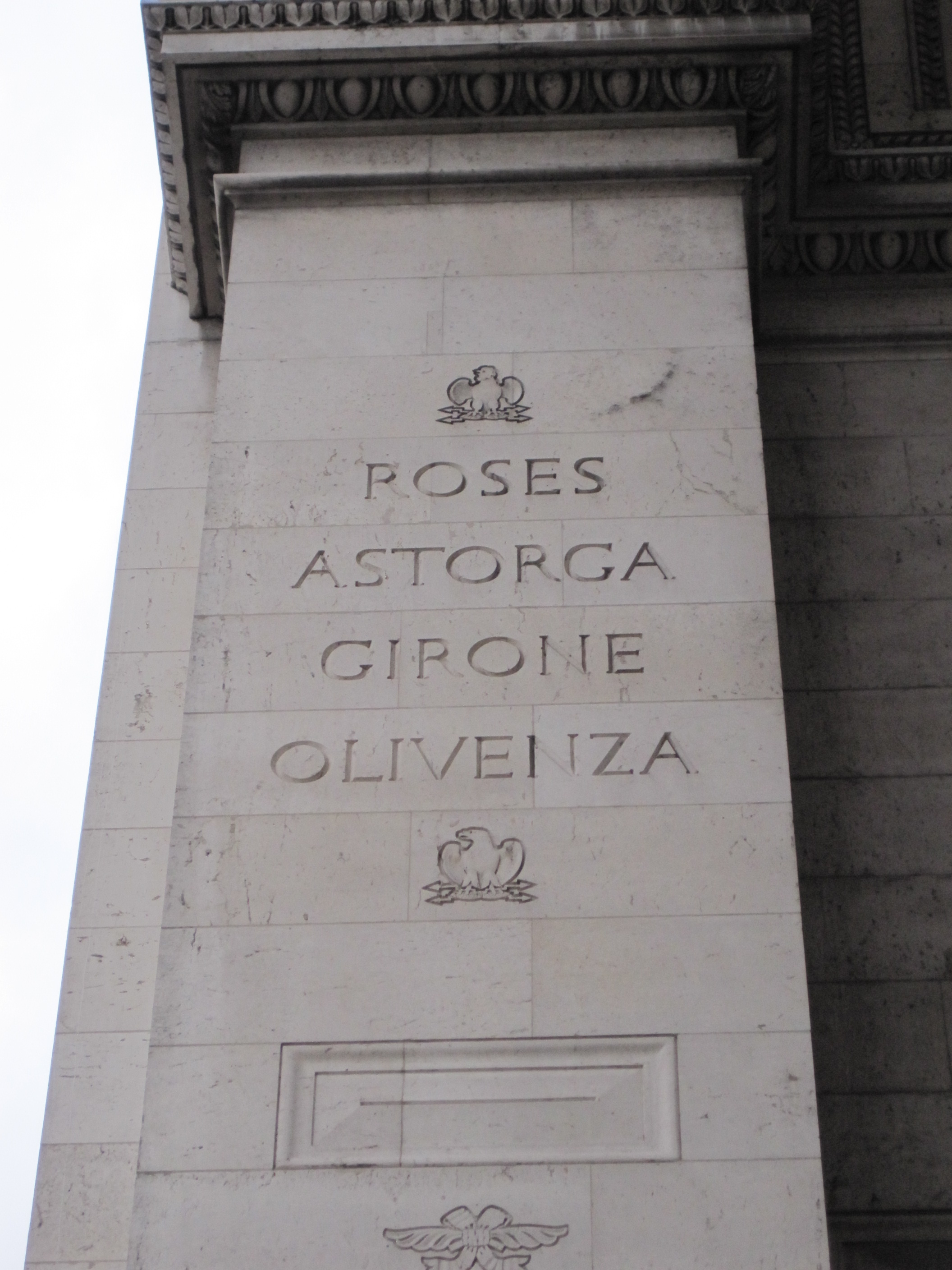 Mención a la ciudad de Astorga (León, España) en uno de los laterales del Arco de Triunfo de París (Francia).